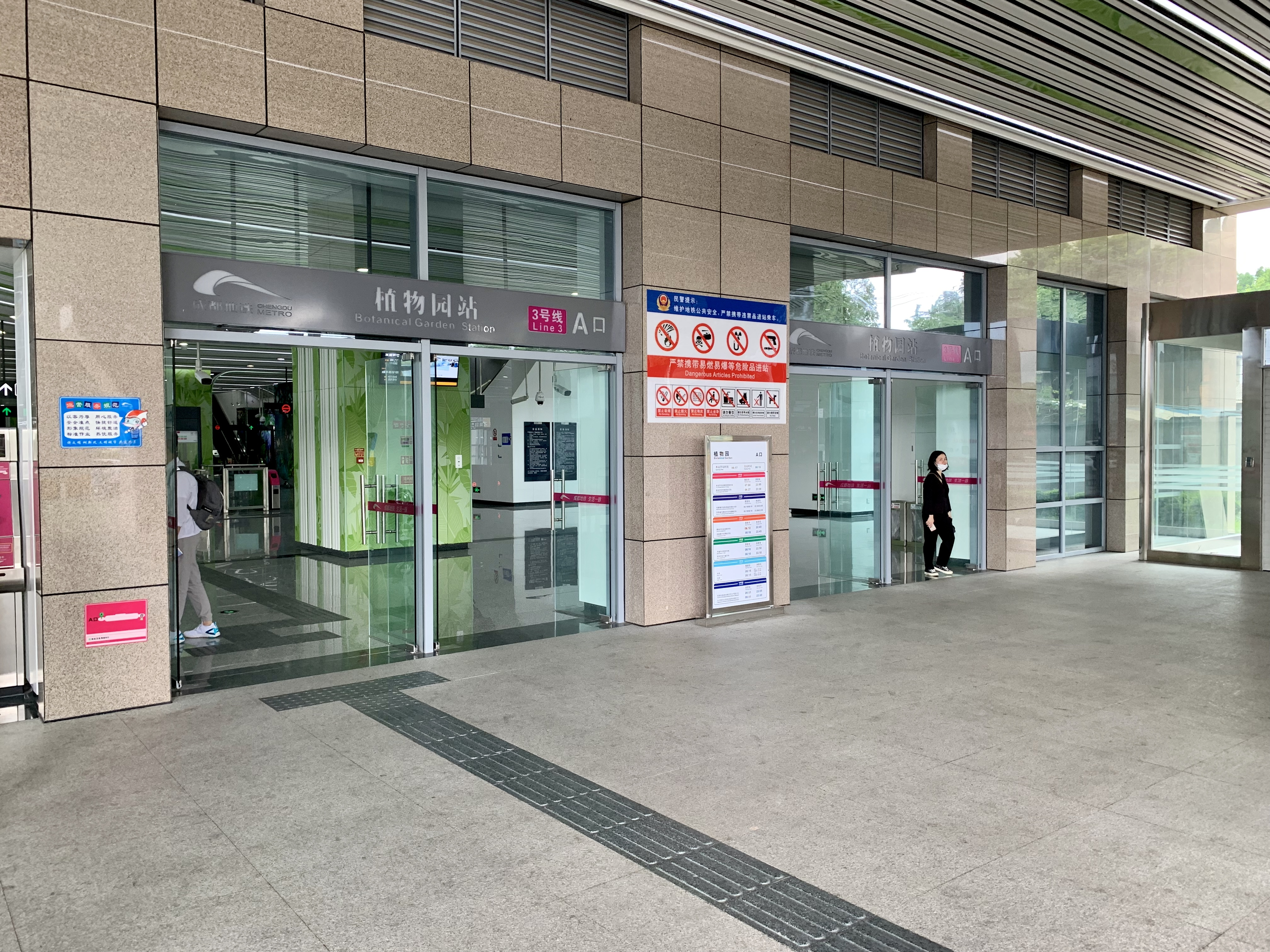 成都地铁植物园站